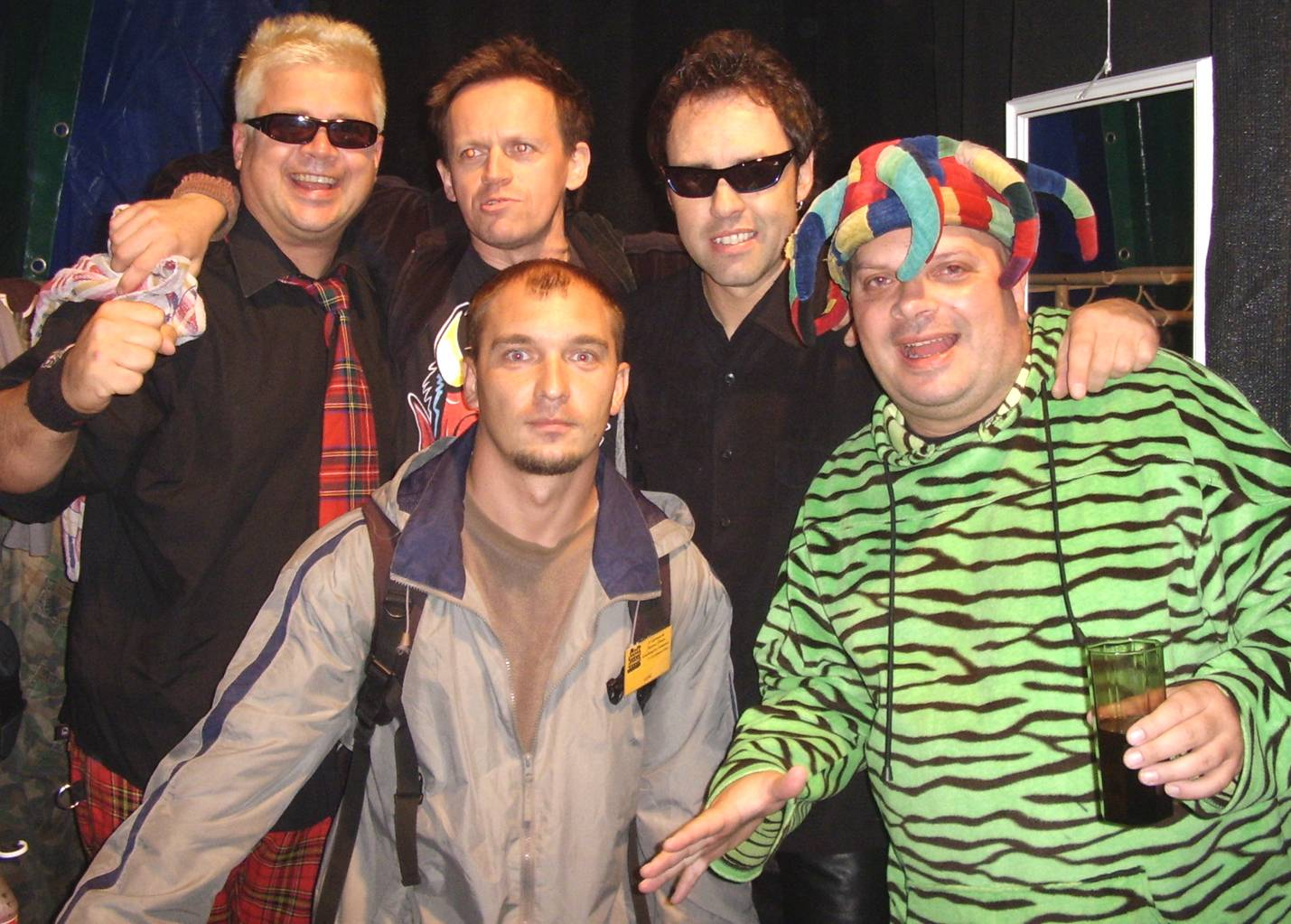 Big Cyc